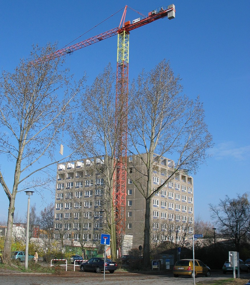 Wohnungsrückbau in Leipzig-Schönefeld: Abriss des 16-geschossigen Plattenbaus Typ „Erfurt“ in der Volksgartenstraße